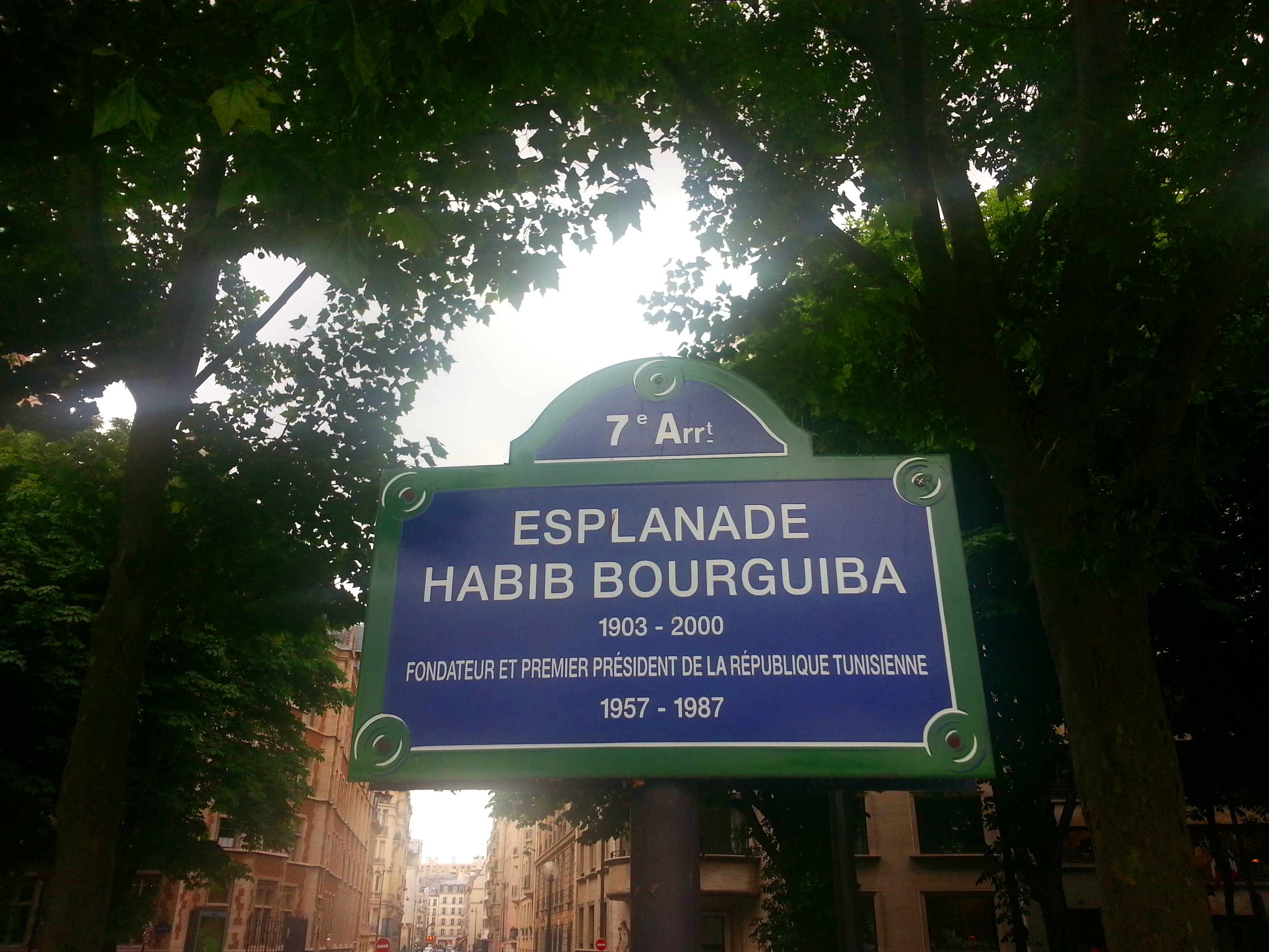 Esplanade Habib-Bourguiba Paris